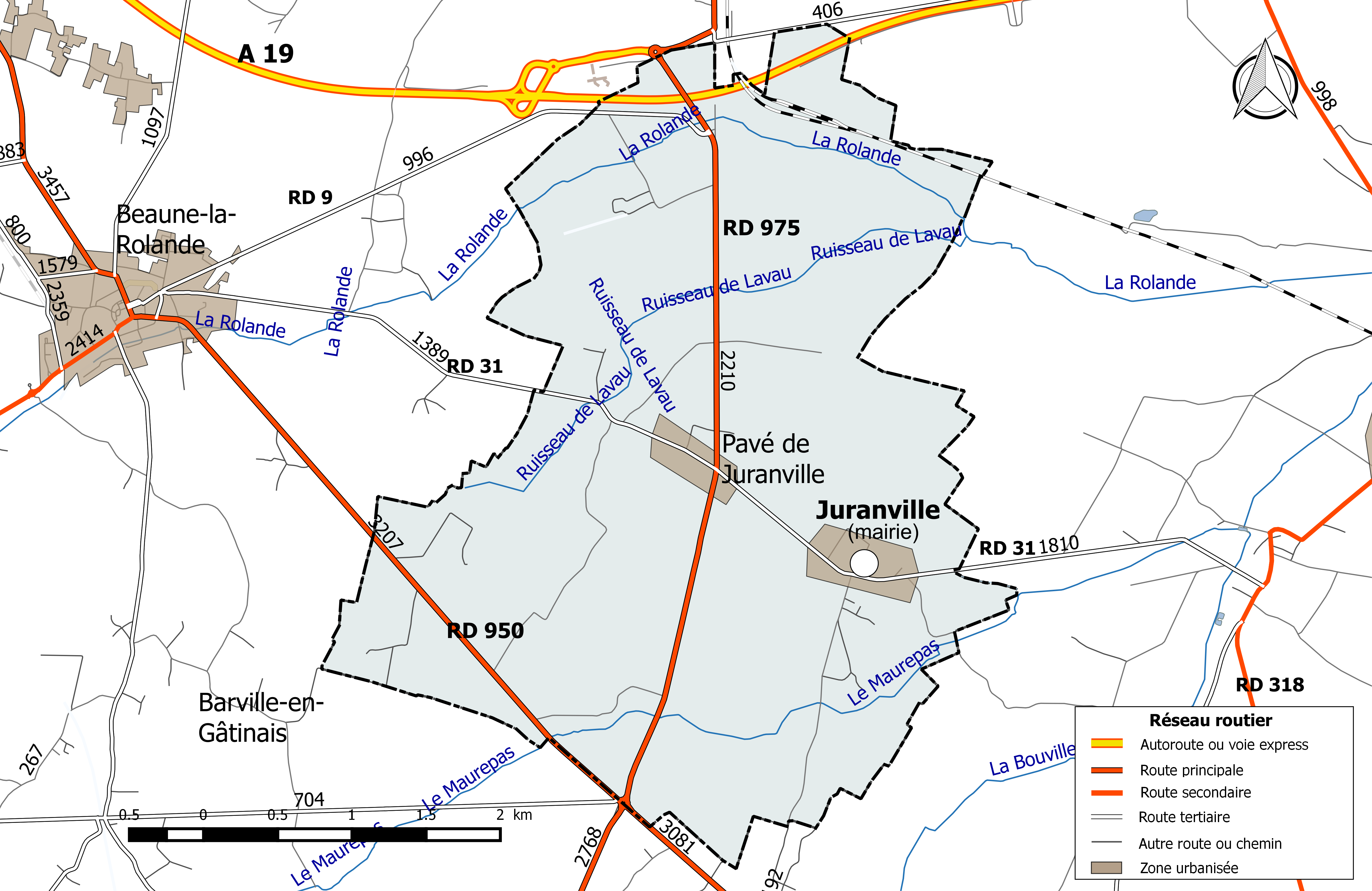 Carte du réseau routier de la commune de Juranville.